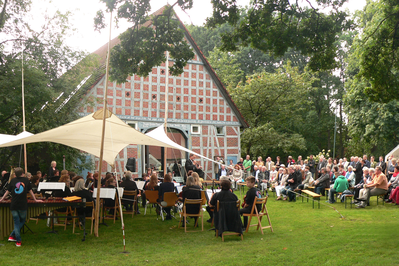 Künstlerhof Schreyahn bei der Eröffnung des Denkmaltages 2015 mit Konzert des Sinfonieorchester der Musikschule Lüchow-Dannenberg